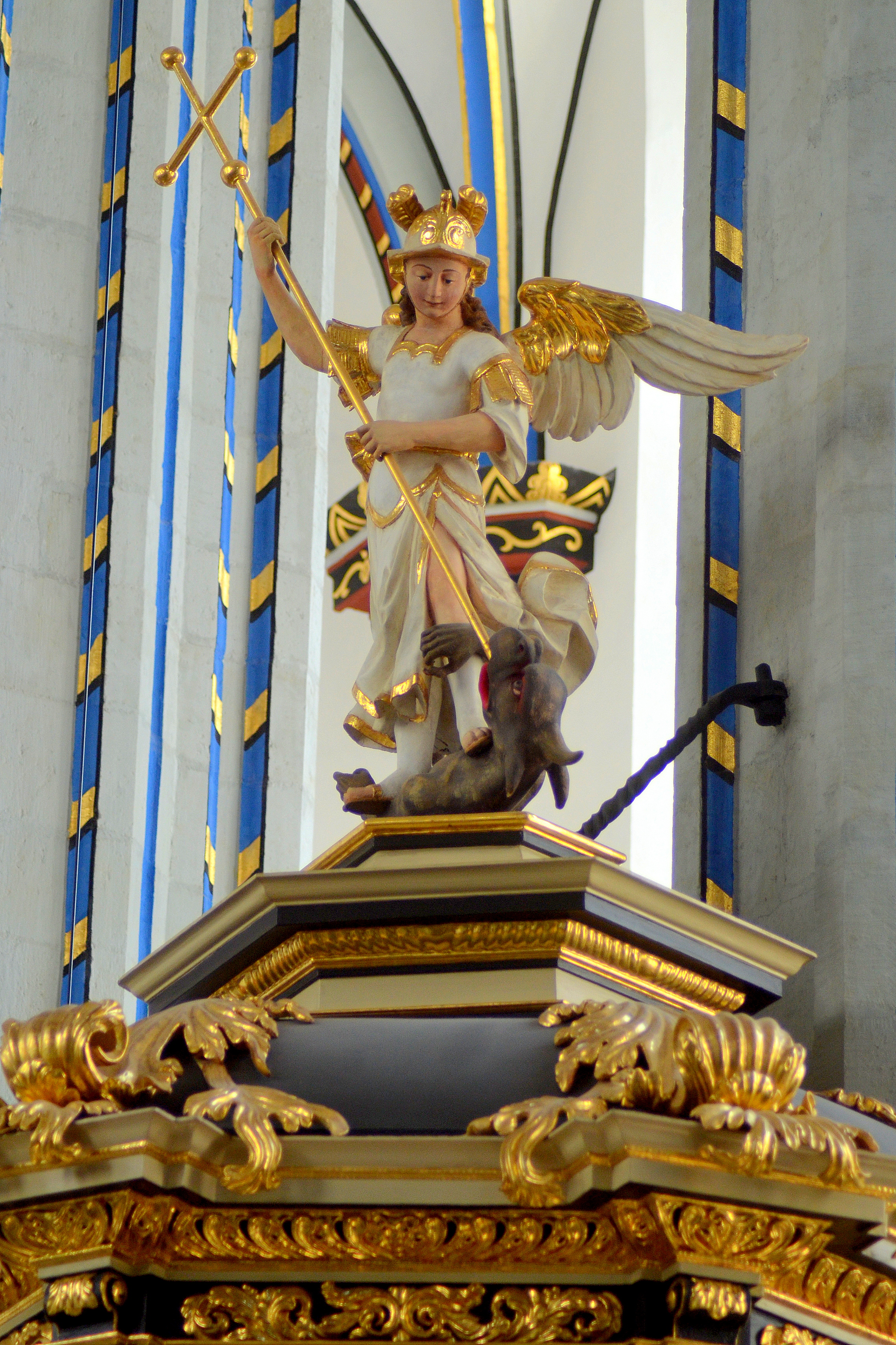 Naam van Jezuskerk (Namen-Jesu-Kirche), beeld op het klankbord van de preekstoel